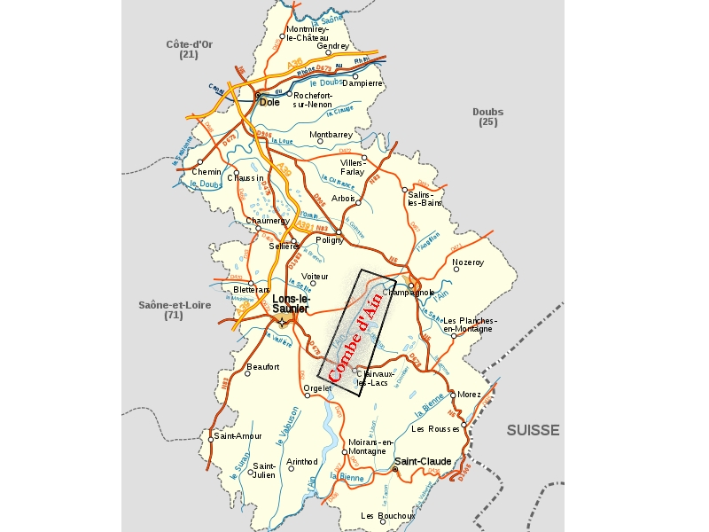 Carte du département français du Jura avec ses réseaux hydrographique et routier principaux.